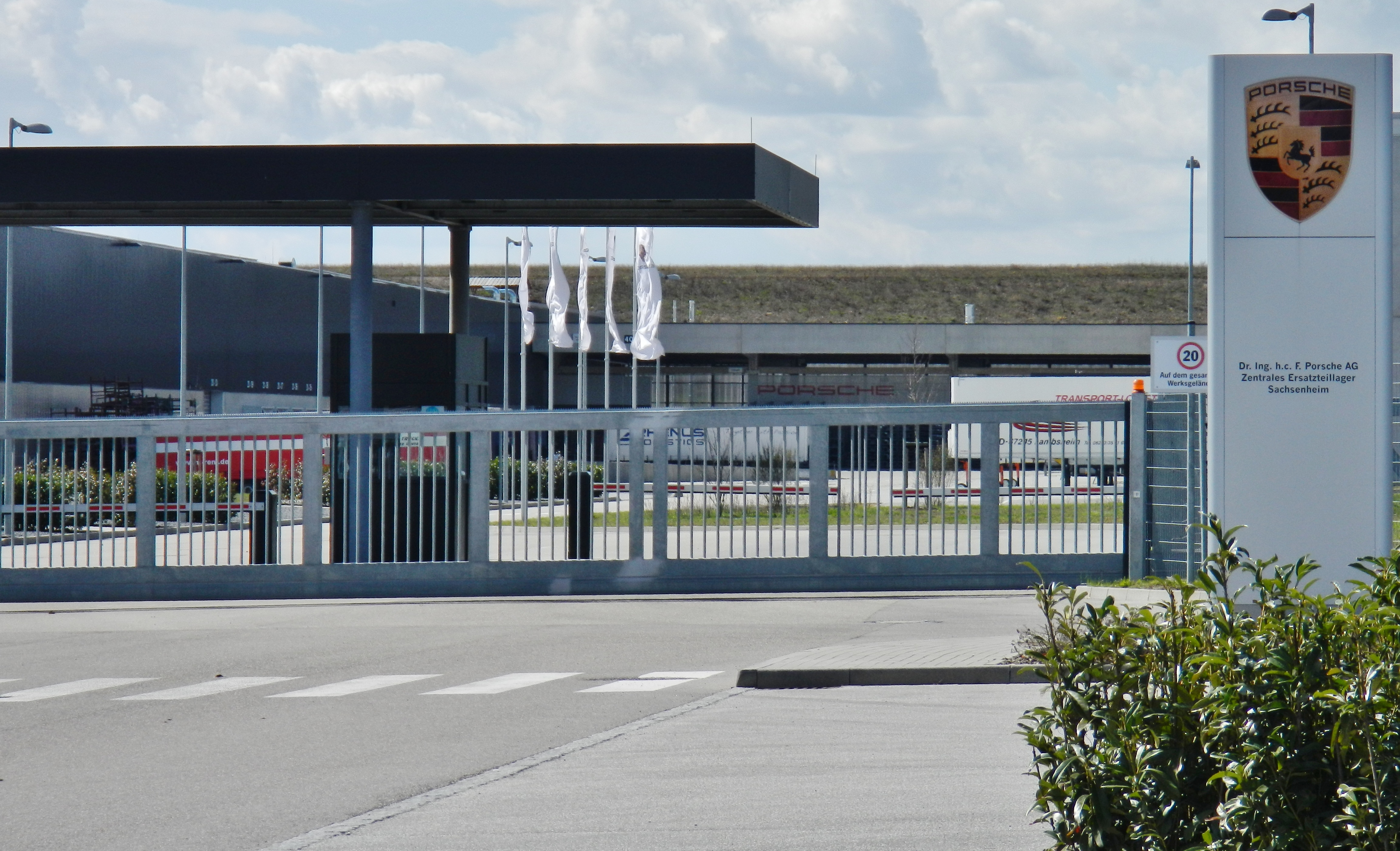 Porsche Ersatzteillager